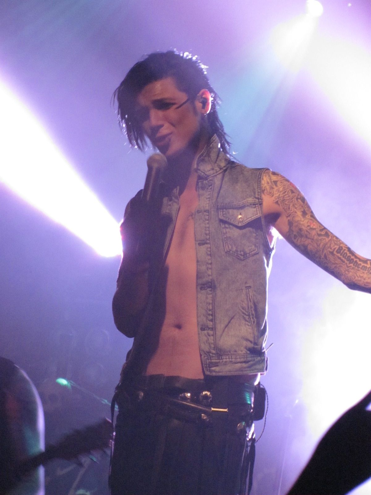 Concierto de la banda Black Veil Brides el 25 de enero de 2013 en Nueva York. En la imagen: Andy Biersack.